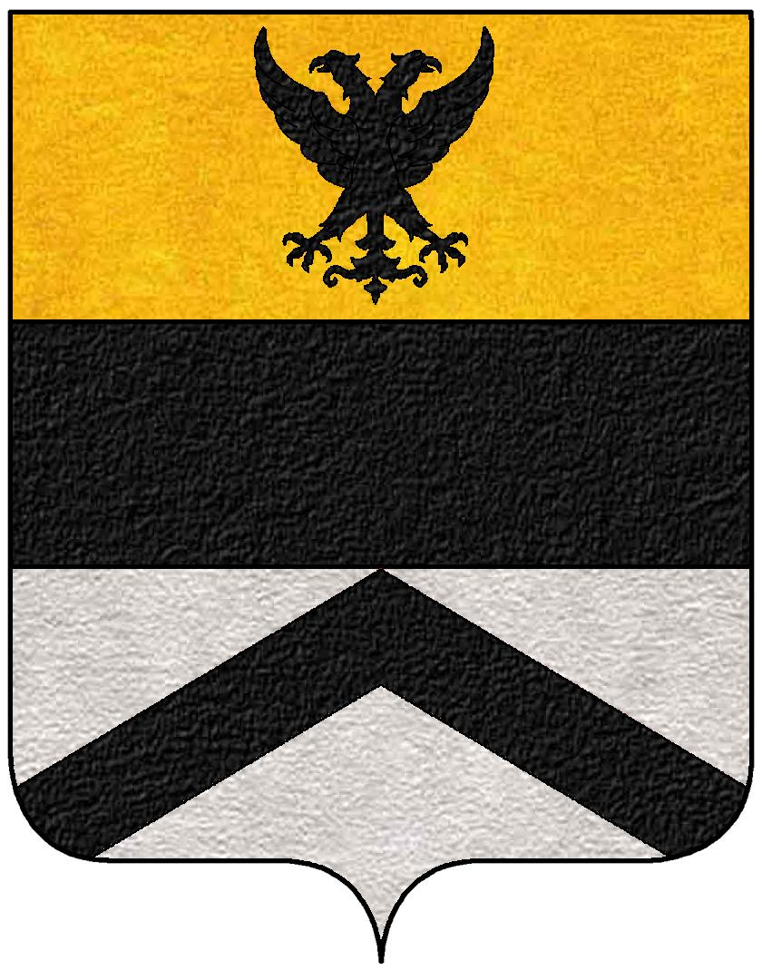 Stemma della famiglia Vecellio